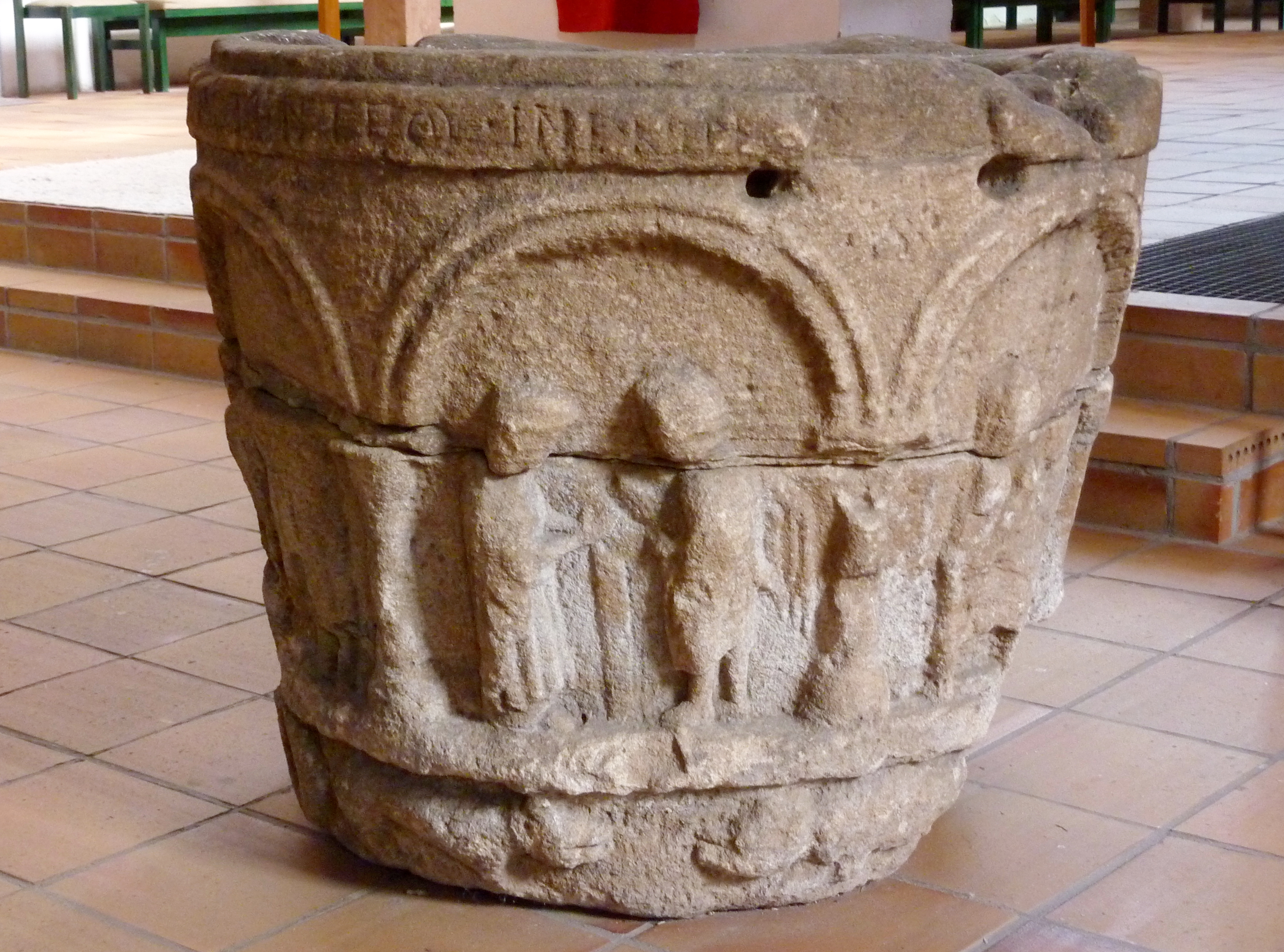 Romanisches Taufbecken in der evangelischen Walpurgiskirche in Alsfeld im Vogelsbergkreis (Hessen), Darstellung: Szenen aus dem Leben Jesu